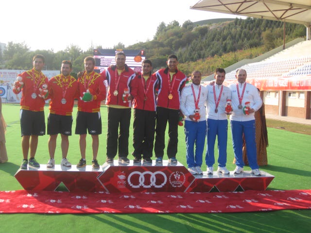 Egypt first Team Gold medal in Mediterranean Games 2013